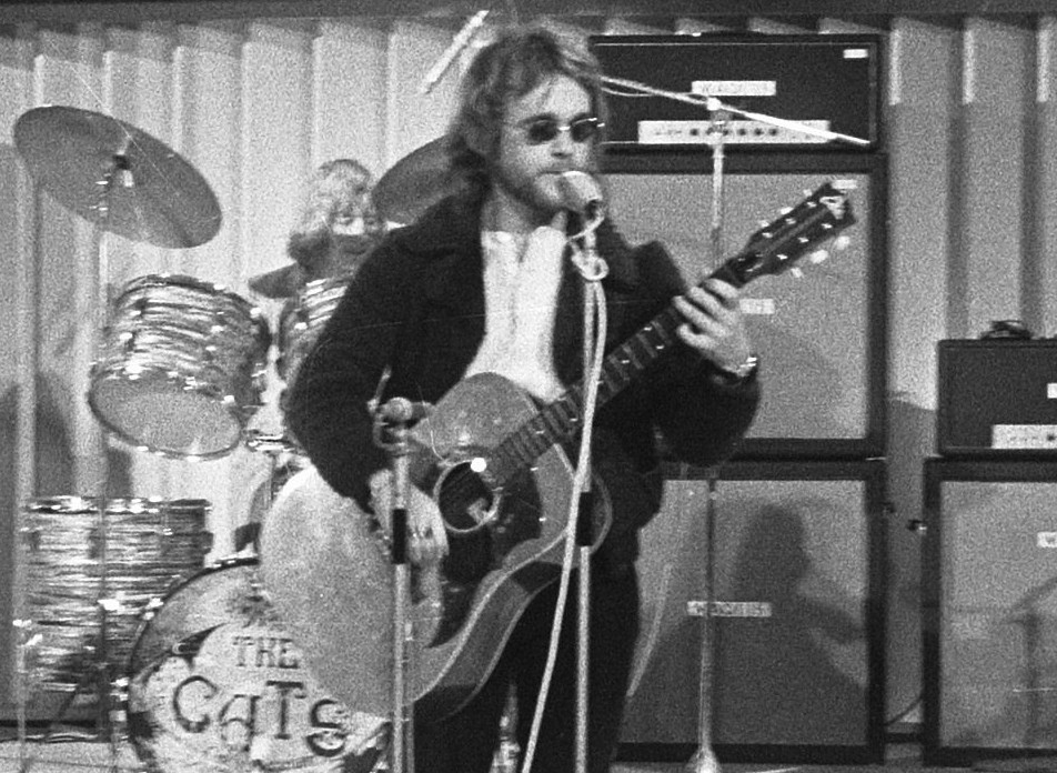 The Cats tijdens repetities voor het Grand Gala du Disque Populaire 1970. Uitsnijding Cees Veerman.